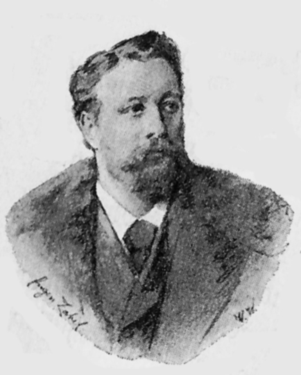 Porträt Eugen Zabel